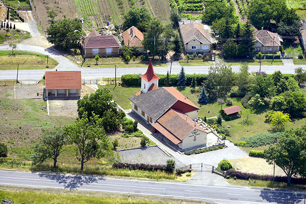 Légi fotó, Krisztus Király-templom, Borsod-Abaúj-Zemplén megye, Szegi